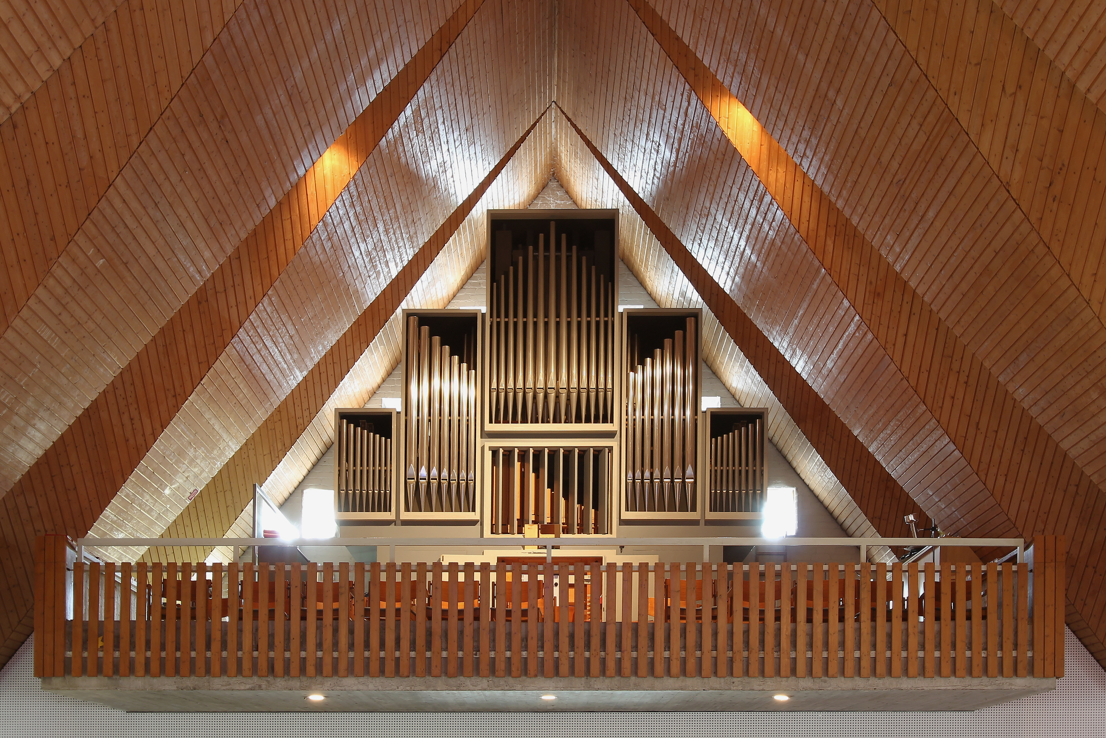 Hamburg-Sasel, Lukaskirche, Orgel